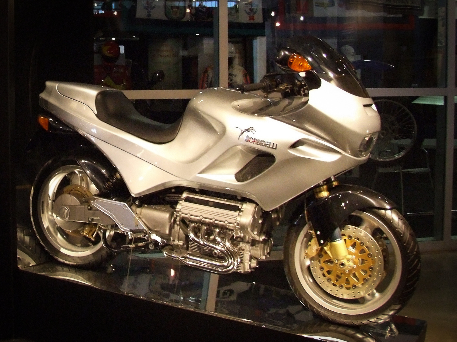 Morbidelli V8 (1997) im Barber Vintage Motorsports Museum, Birmingham Alabama USA